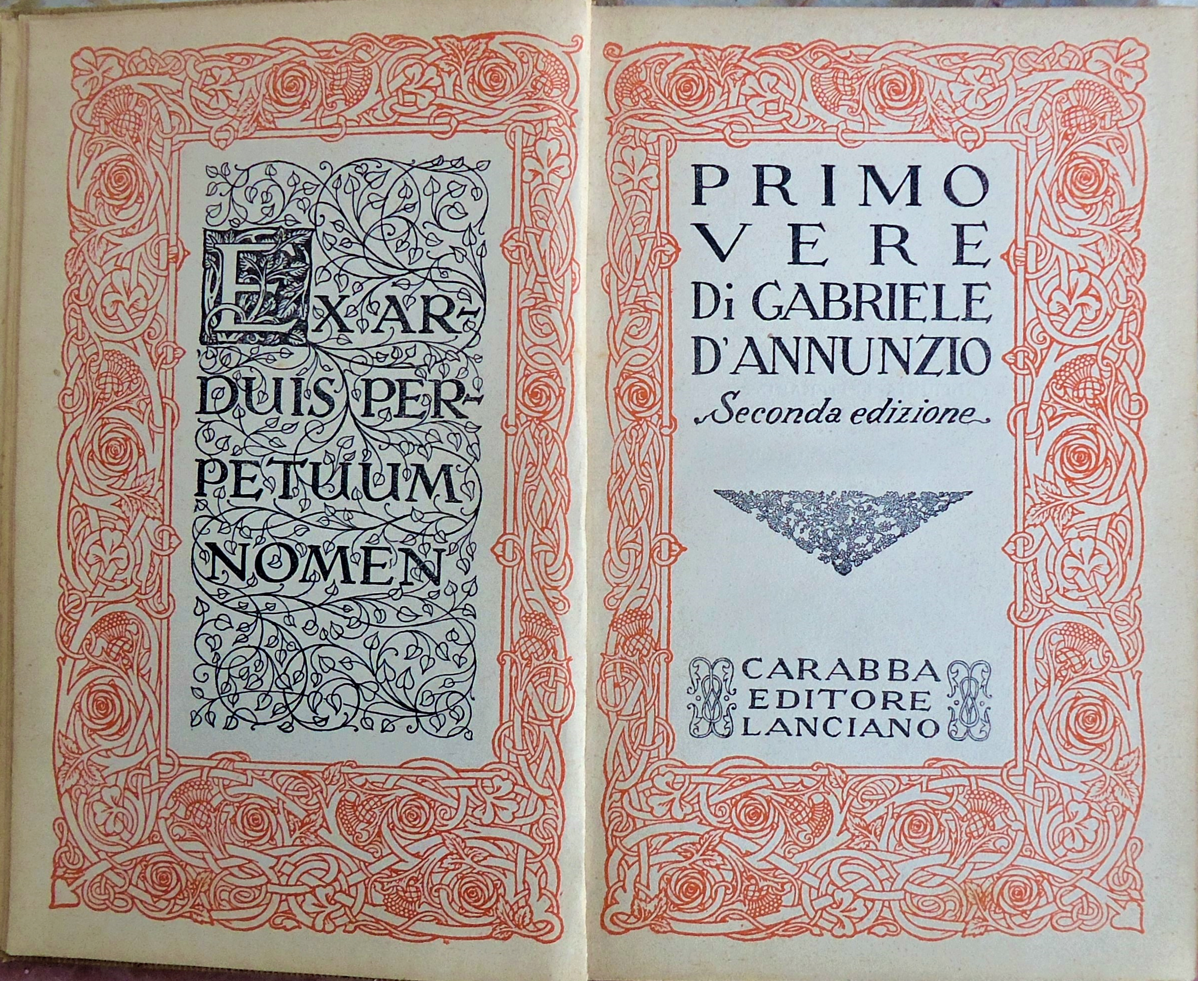 Collana Scrittori italiani e stranieri. Da d'Annunzio corretta con penna e fuoco e aumentata. Testo identico alle edizione Carabba del 1880. (Collezione Fausta Samaritani-d'Annunzio)